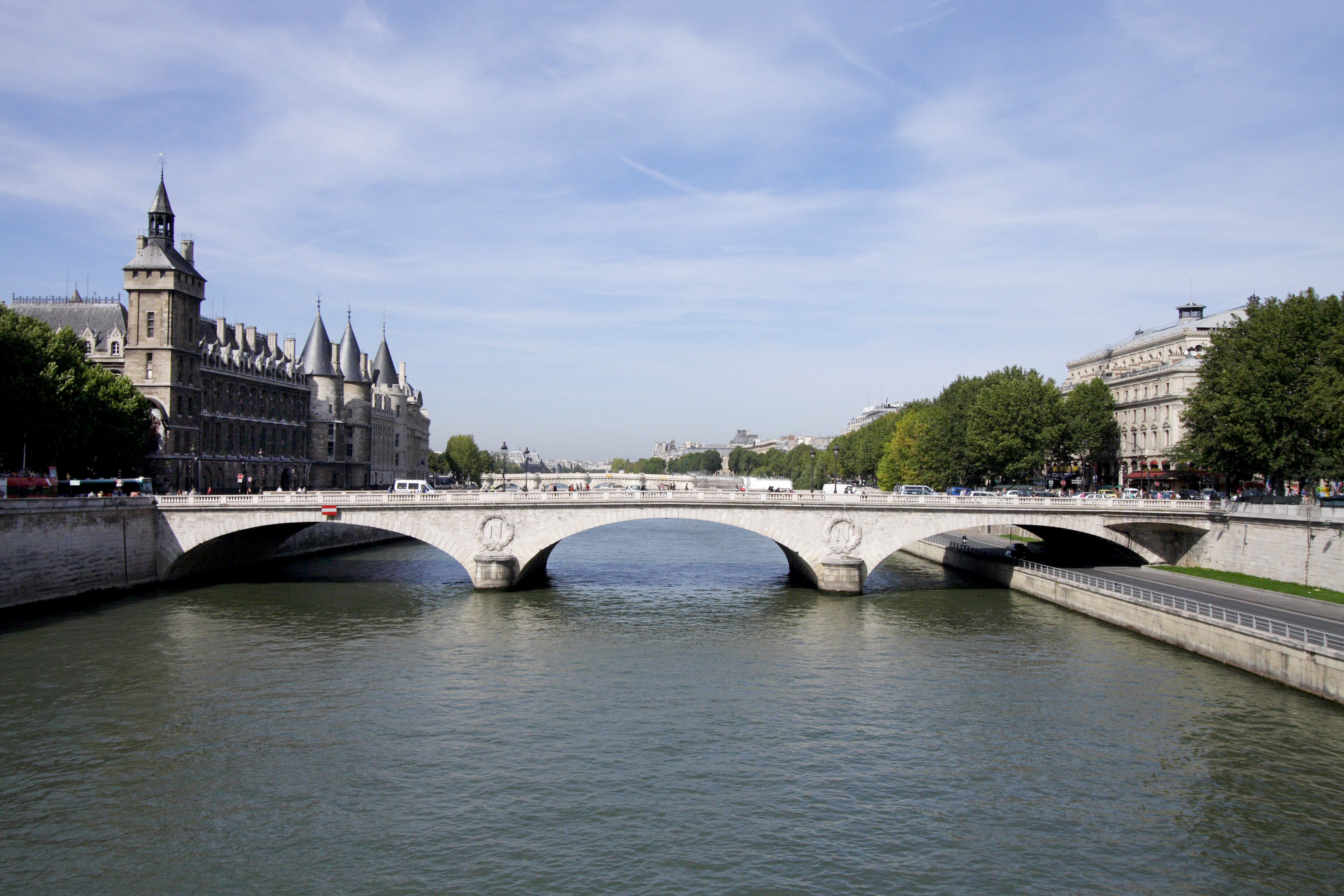 Pont au Change(Paris, France)